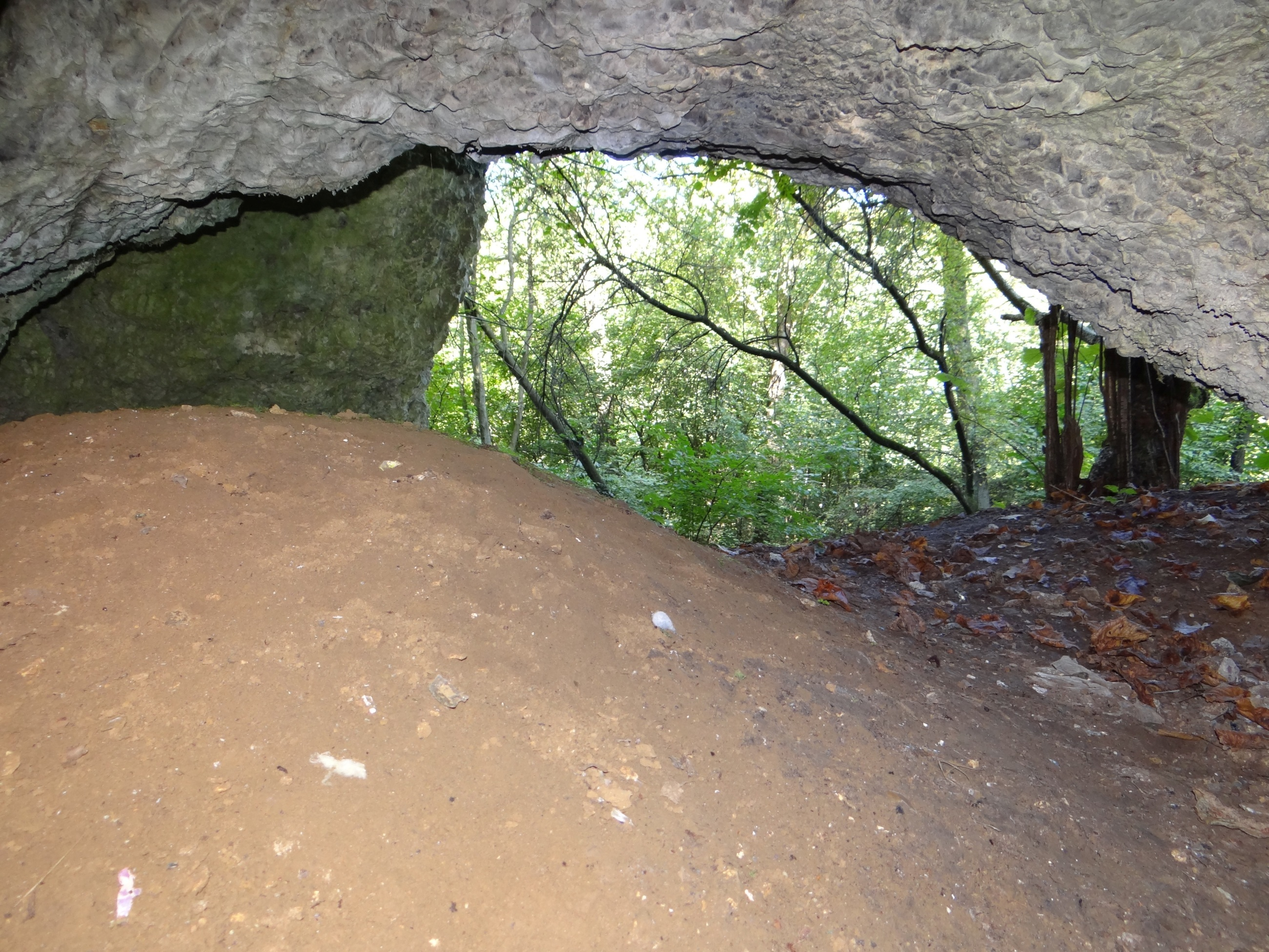 Jaskinia Gaudynowska